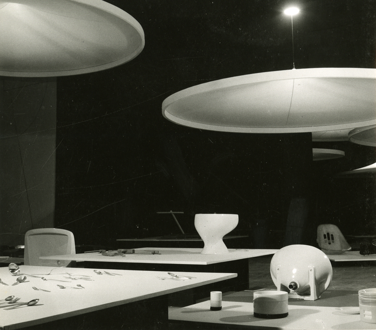 Milano. Palazzo dell'Arte. X Triennale di Milano. A e P.G. Castiglioni, R. Menghi, M. Nizzoli e A. Rosselli, Mostra dell'Industrial Design. Allestimento. Servizio fotografico : Milano, 1954 / Paolo Monti. - Stampe: 2 : Positivo b/n, gelatina bromuro d'argento/ carta, 18x24. - ((Al verso delle stampe manoscritti i numeri dei negativi corrispondenti secondo altra numerazione: 1038; timbro a inchiostro con copyright (Foto "Fotogramma" s.r.l. - Via Colonna - Milano). - Sul coperchio della scatola iscrizione didascalica manoscritta a pennarello nero: "Musei". - La X Triennale (Prefabbricazione - Industrial Design: Esposizione Internazionale delle Arti Decorative e Industriali Moderne e dell'Architettura Moderna) si tenne dal 28 agosto al 15 novembre del 1954. - Occasione: Documentazione della X Triennale di Milano, 1954. - Fonte: Monografia di Pica, Agnoldomenico: Storia della Triennale di Milano, 1918-1957, Milano, Edizioni del Milione (1957)